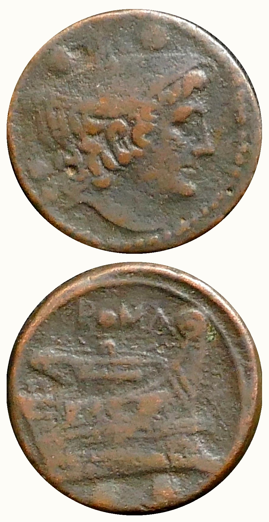 Monnaie de bronze : Sextans, République romaine, vers 250 av-JC. 2 globules, diamètre environ 28 mm, poids 20 g. Collection privée.